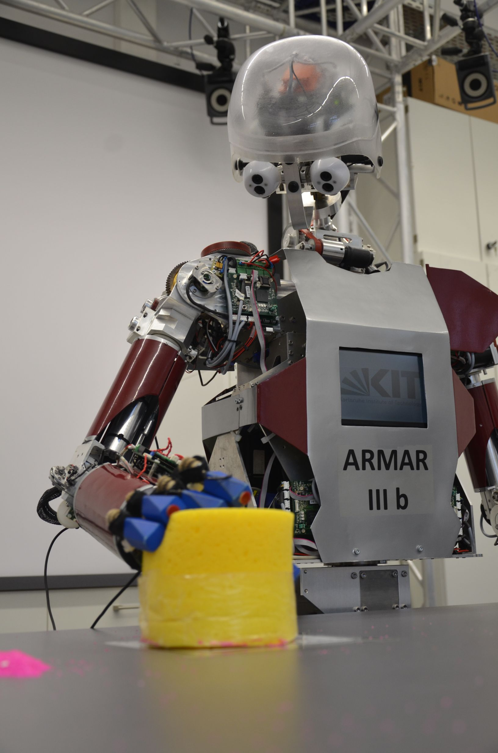 Exkursion der WikiCon zum KIT, Institut für Anthropomatik, mit verschiedenen Armar-Generationen, Armar IIIb schaut seine Hand und das ergriffene Objekt zwecks optischer Erkennung an